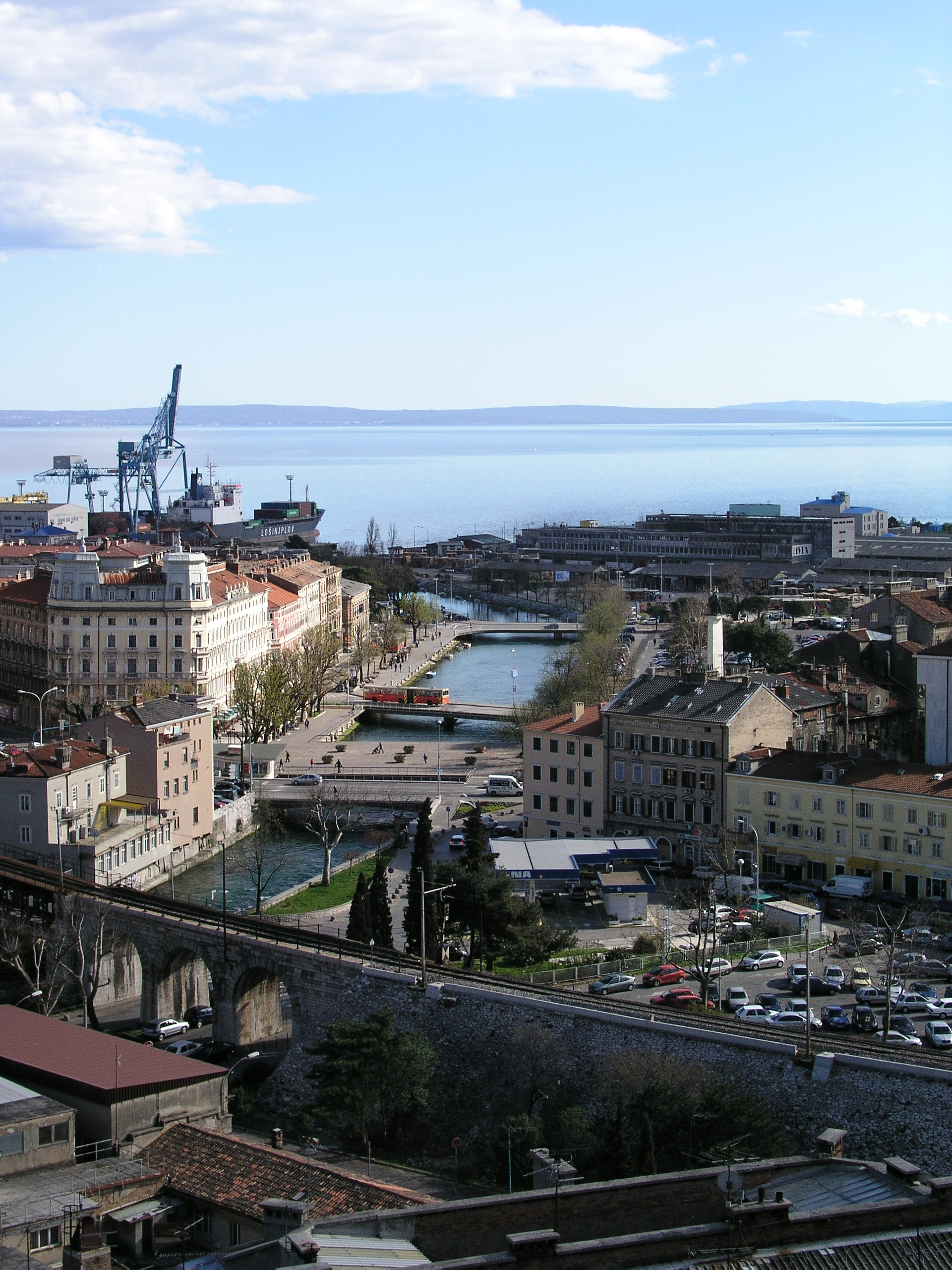 River Rjecina in Rijeka (Croatia)